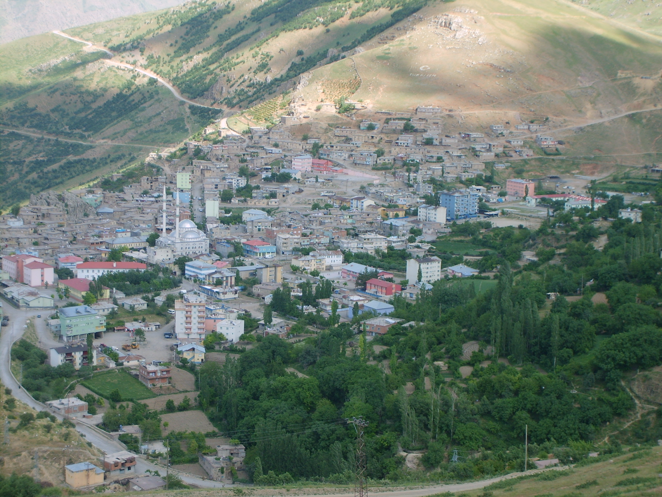 Siirt Pervari genel görünüş